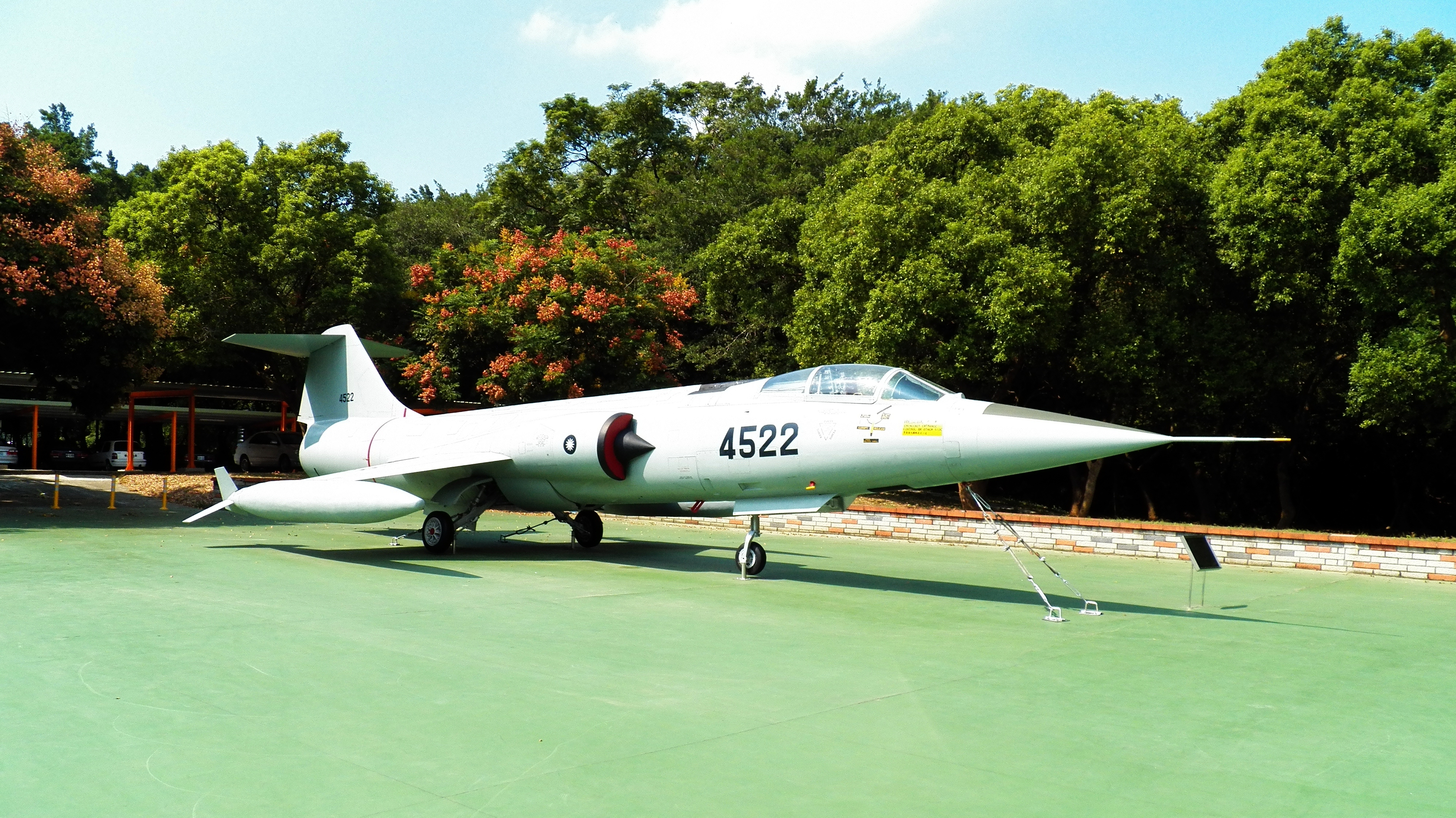 成功嶺展示的中華民國空軍F-104J（編號4522），2012年營區開放日攝影。